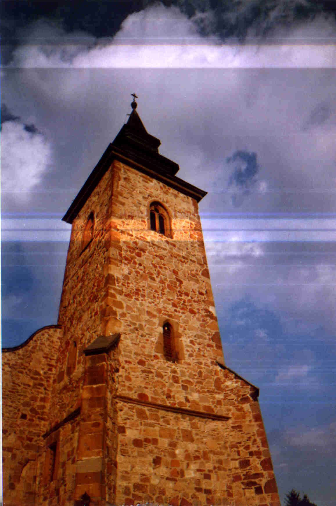 Szent Márton templom Bogácson